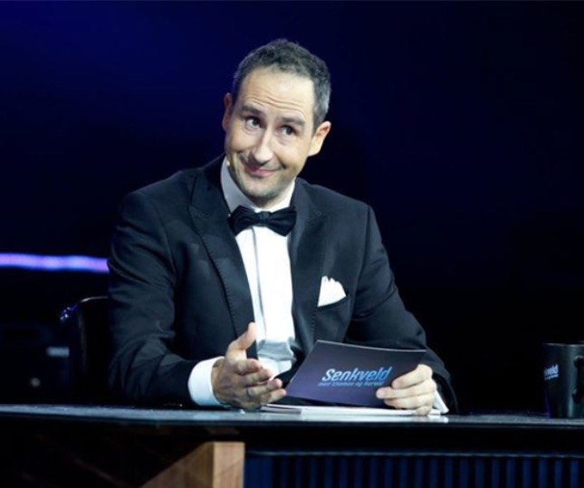 Senkveld med Thomas og Harald sitt 10 års jubileum